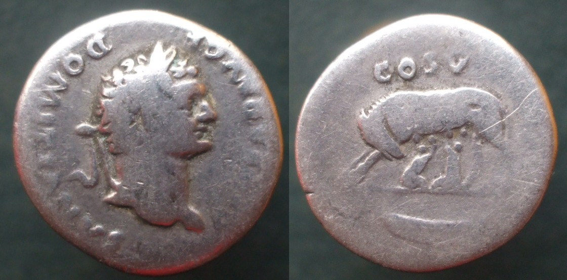 Domitien denier cos v louve romulus remus